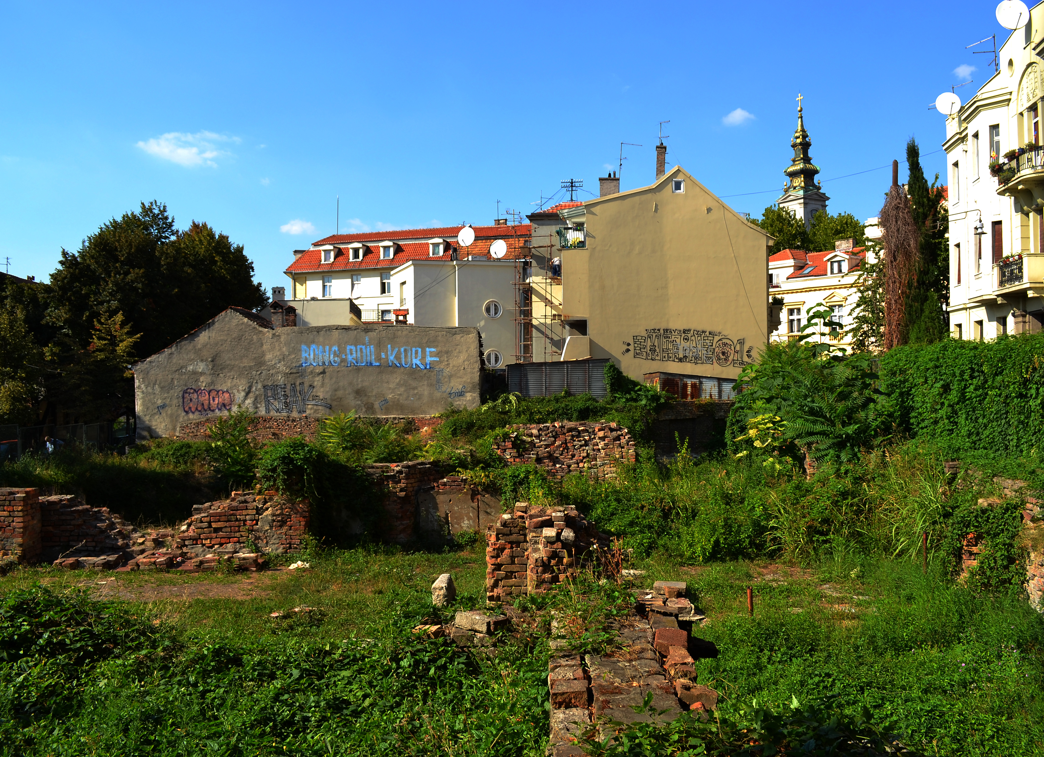 Косанчићев венац